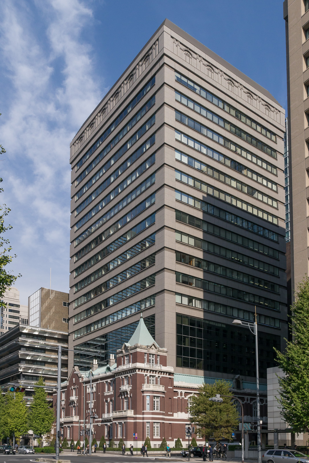 東京銀行協会ビル、東京都千代田区丸の内。